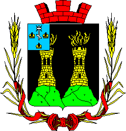 Герб села Маяки, Біляївський район